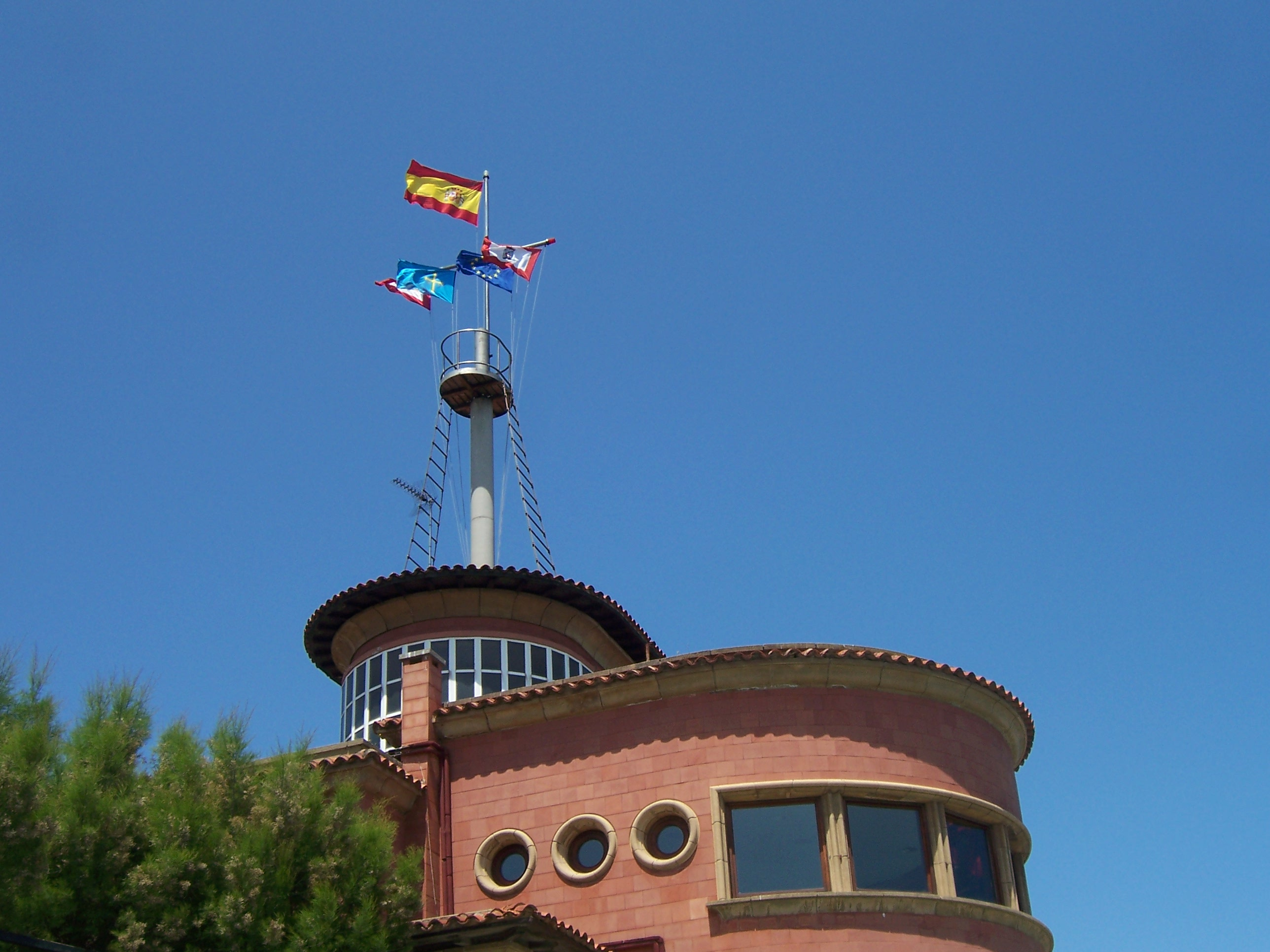 Sede del Real Club Astur de Regatas, Pabellón de Santa Catalina, Gijón. Clubhouse, Royal Astur Yacht Club, Gijón.